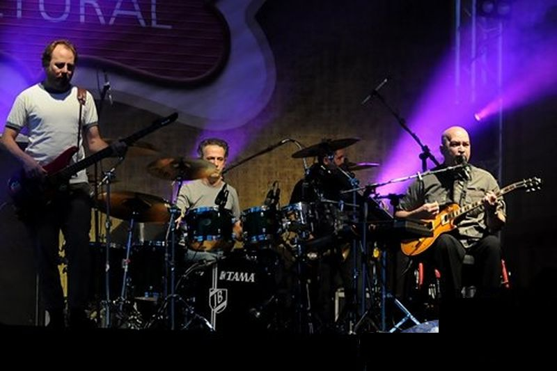 A banda de rock Paralmas do Sucesso durante apresentação em Brasília